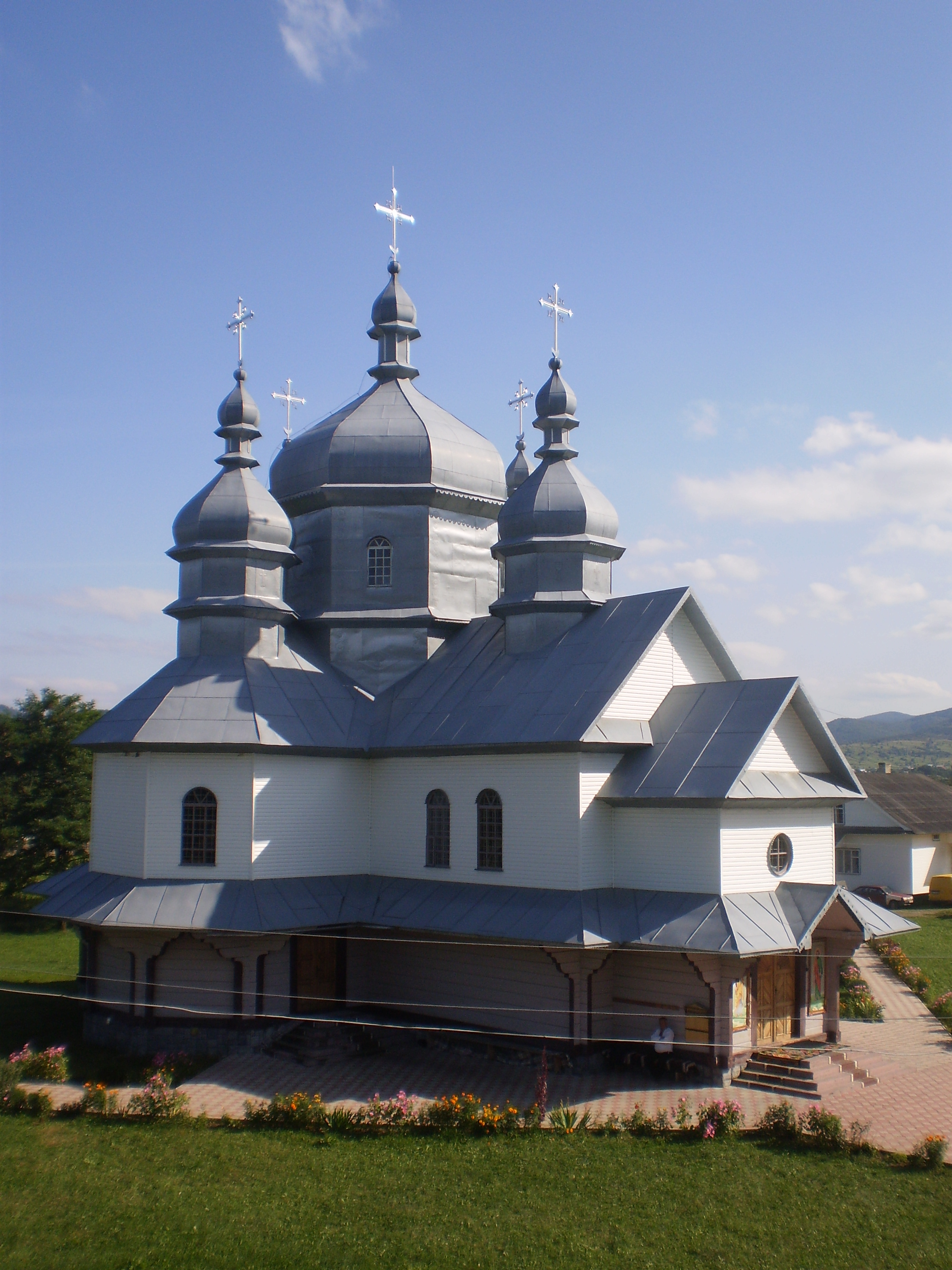 с. Закерничне. Церква